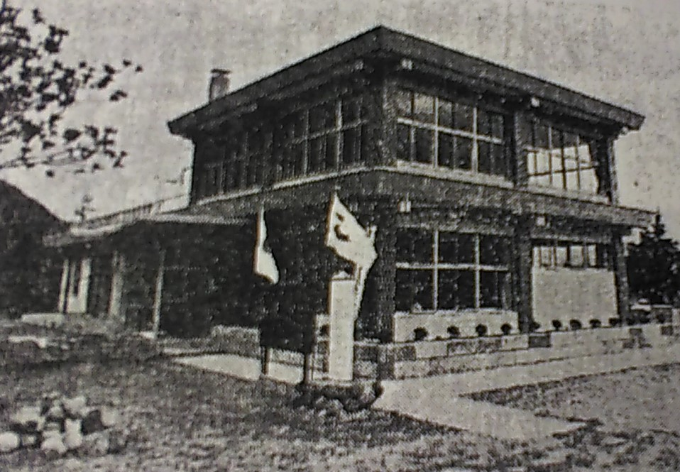 長野県上田市にあった上田市立丸子金子図書館（2006-2012）。上田市立丸子図書館（2012-）の前身。建設時の名称は丸子町立金子図書館（1966-2006）。